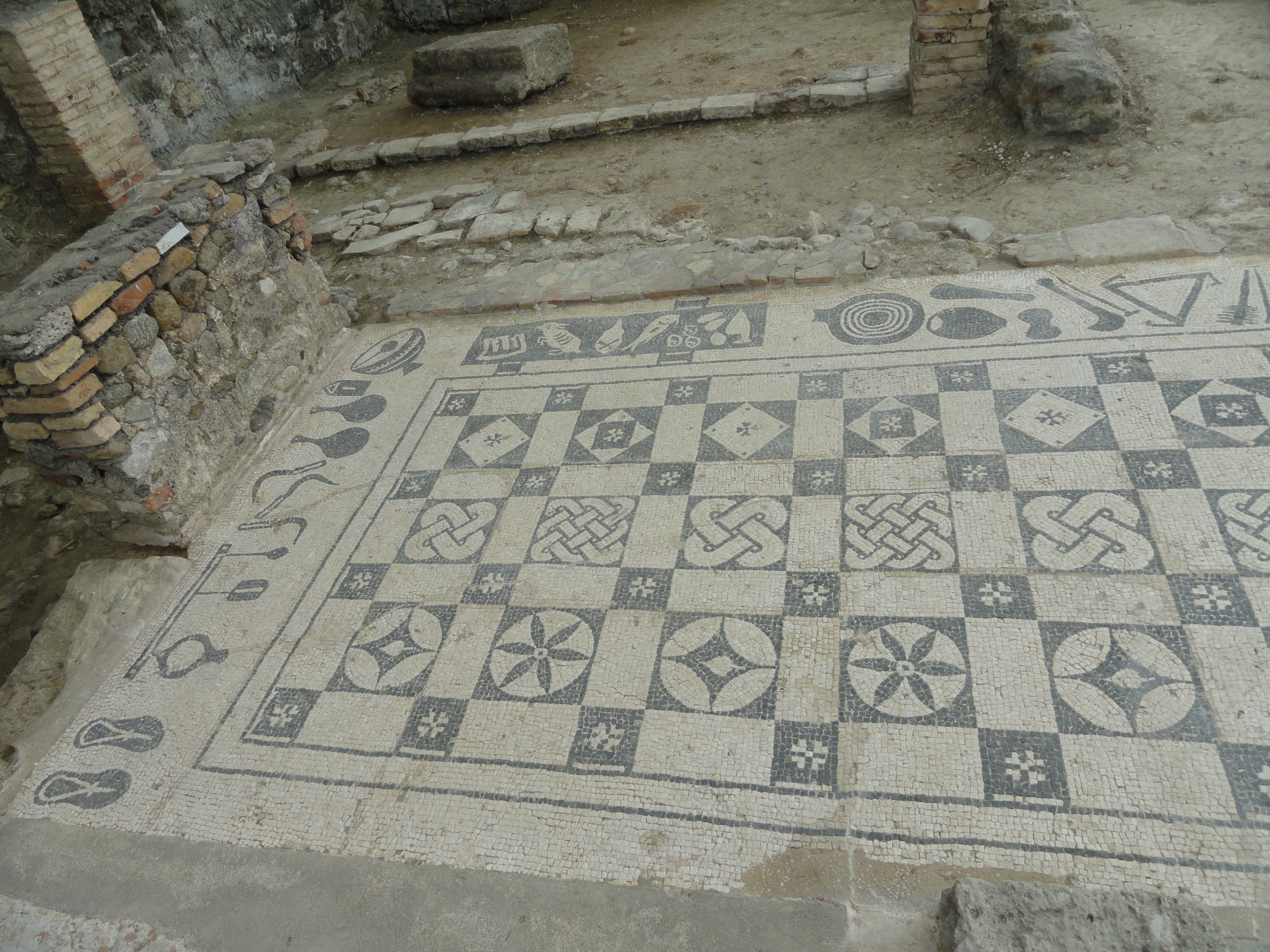 Villa romana Río Verde